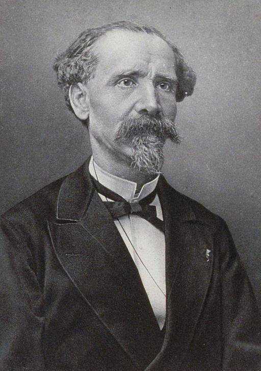 Gustave Bleicher. 1890. Bibliothèque nationale et universitaire de Strasbourg